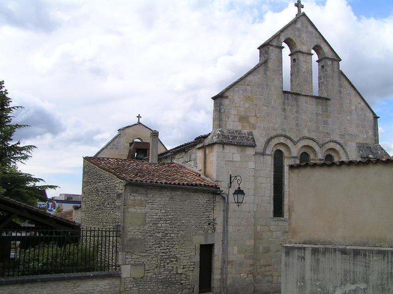 église saint-Martin, Cognac, Charente, France